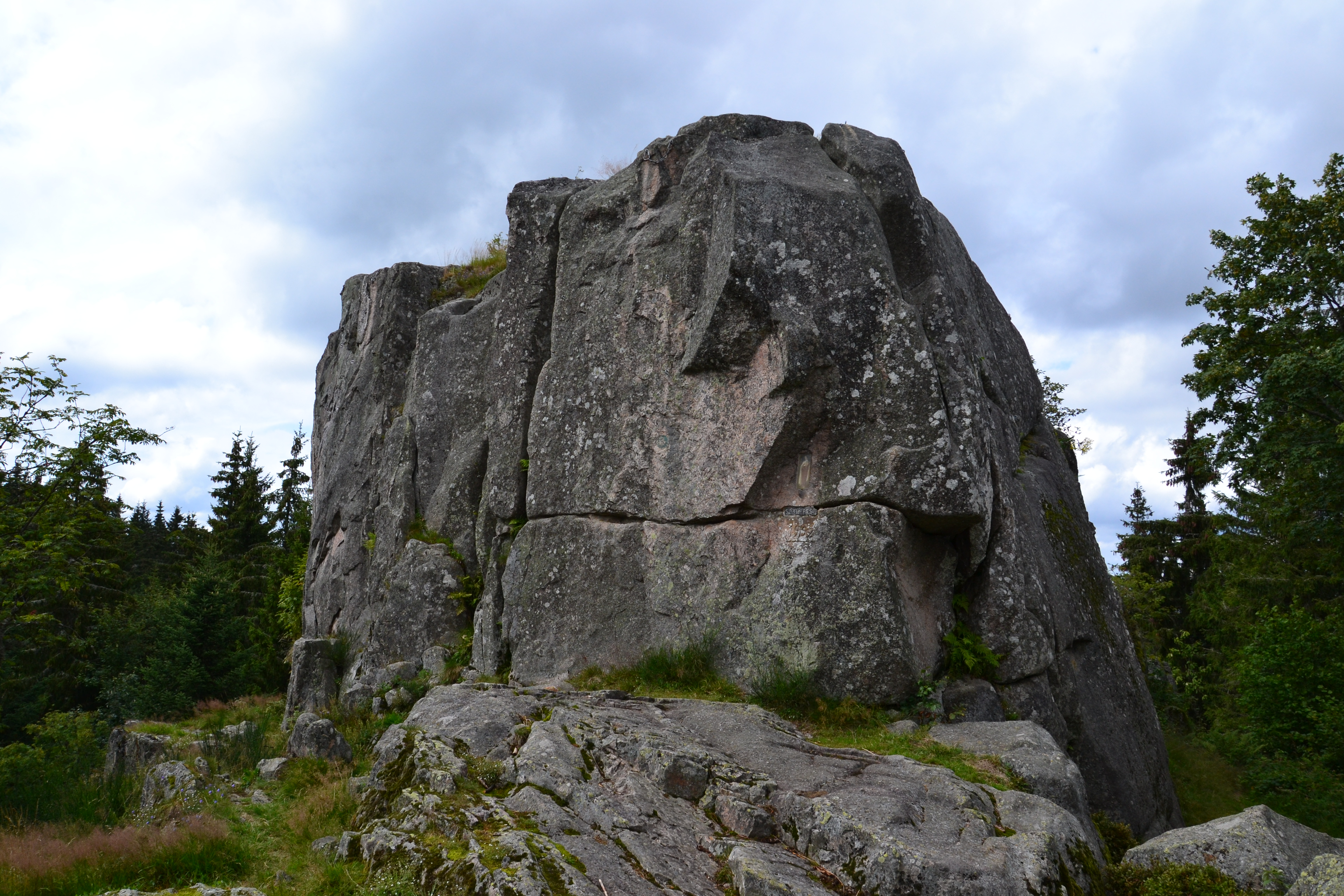 Le rocher du Moutier des Fées (1062 m) à La Bresse.